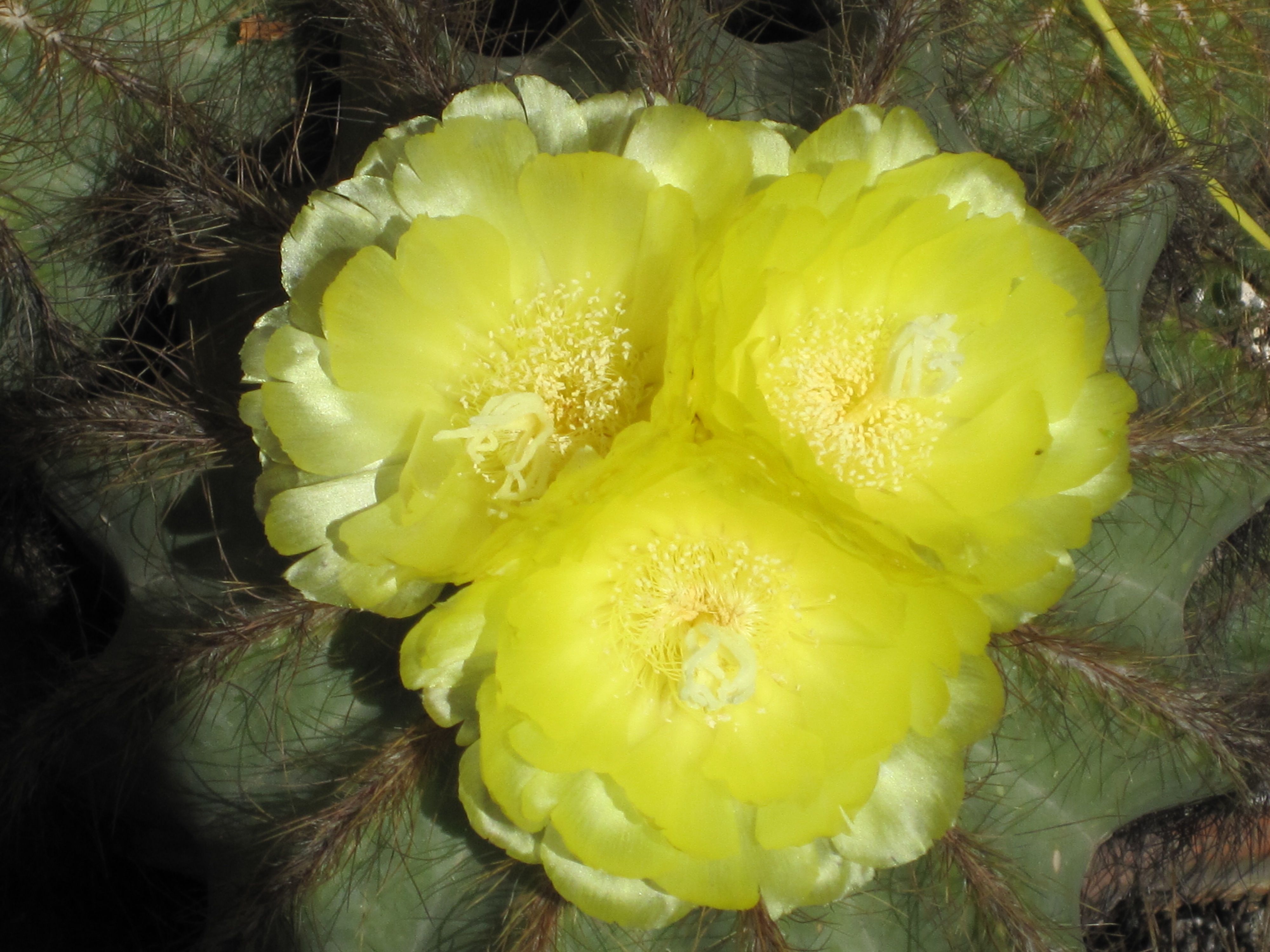 I fiori dorati della parodia magnifica